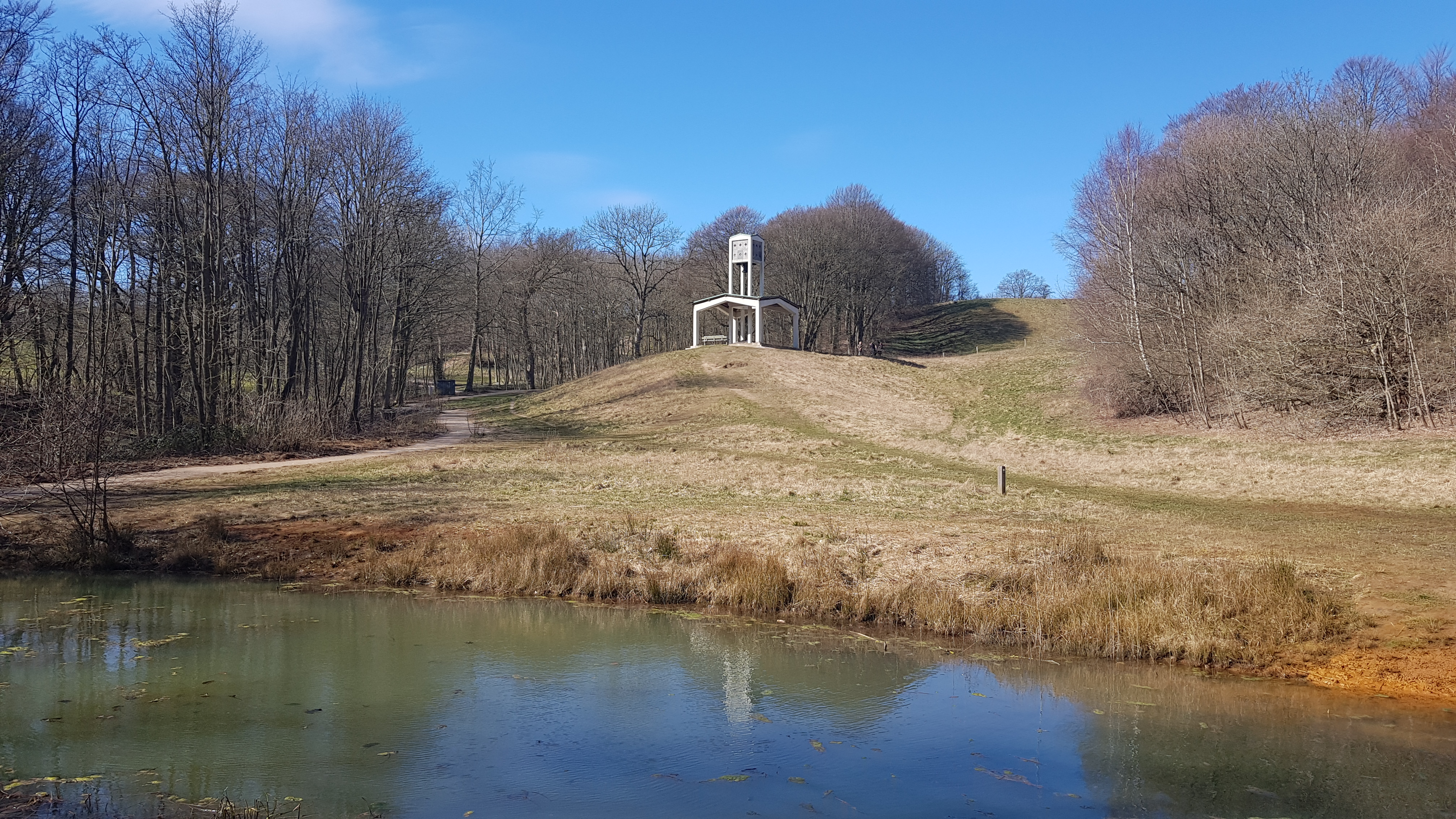 Klokkestablen på Skamlingsbanken